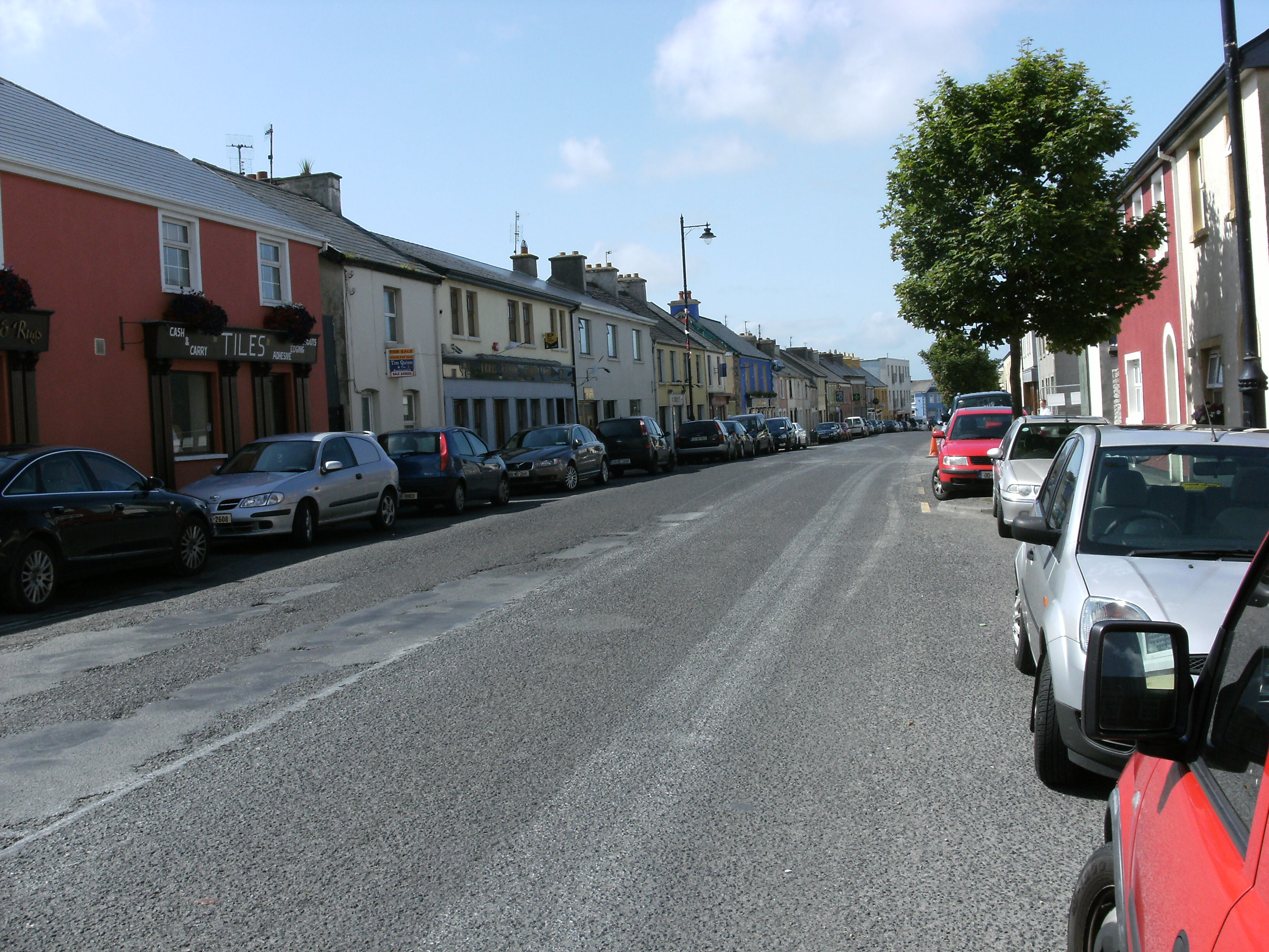 Belmullet view